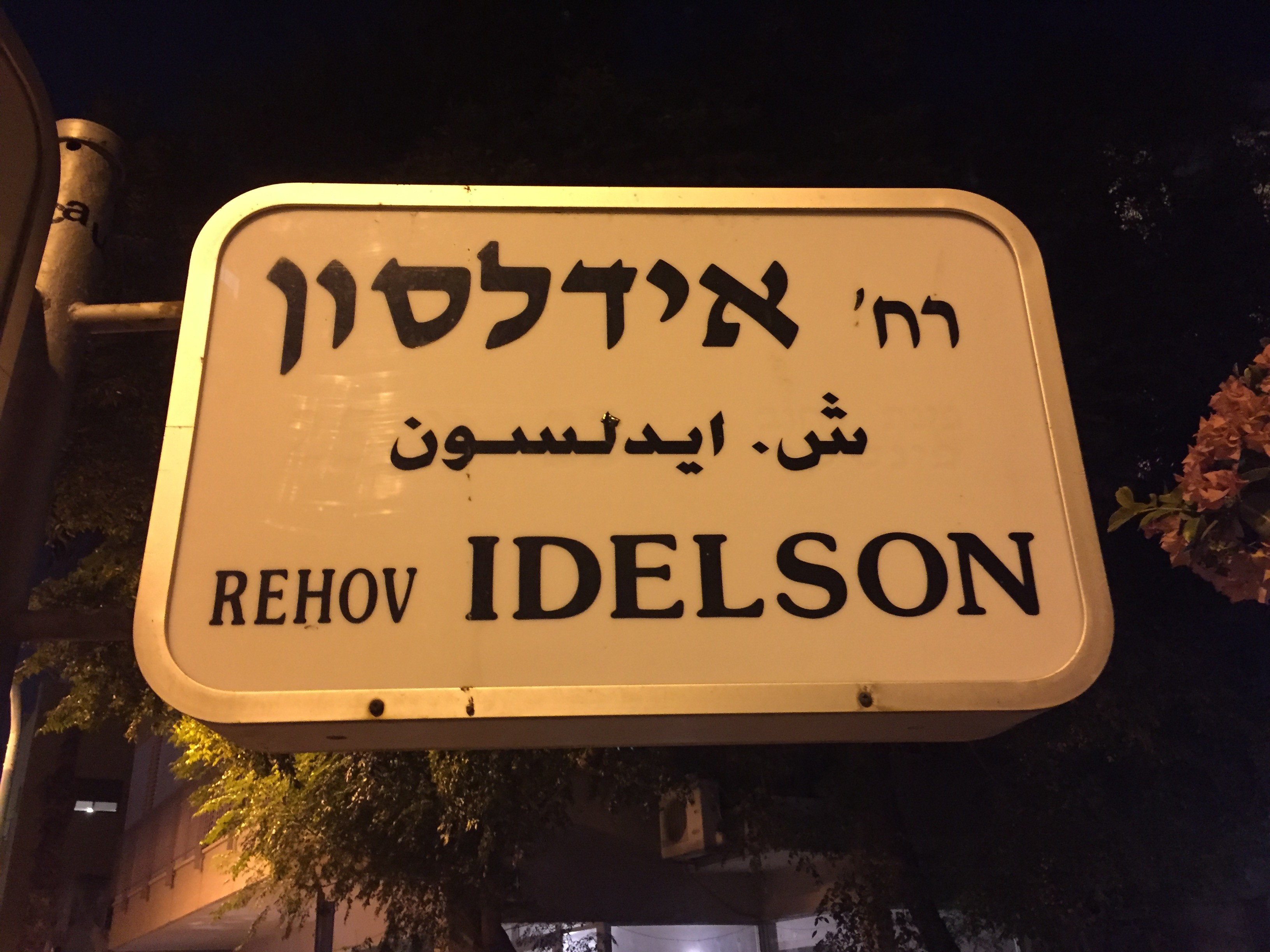 שלט רחוב עם שמו של אברהם אידלסון בתל אביב